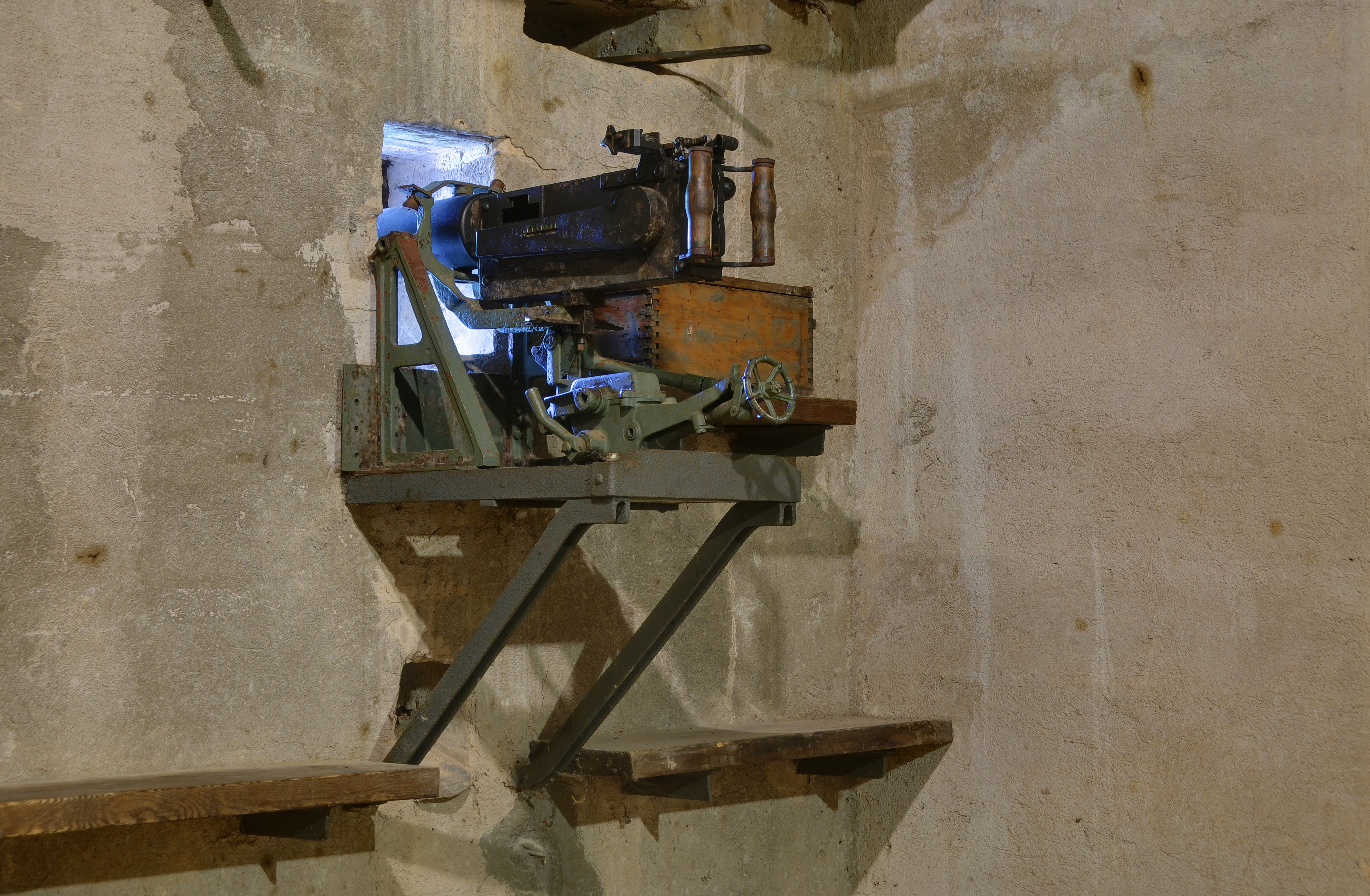 Mitrailleuses dans la casemate visitée. Feste Kaiser Wilhelm II (HDR).